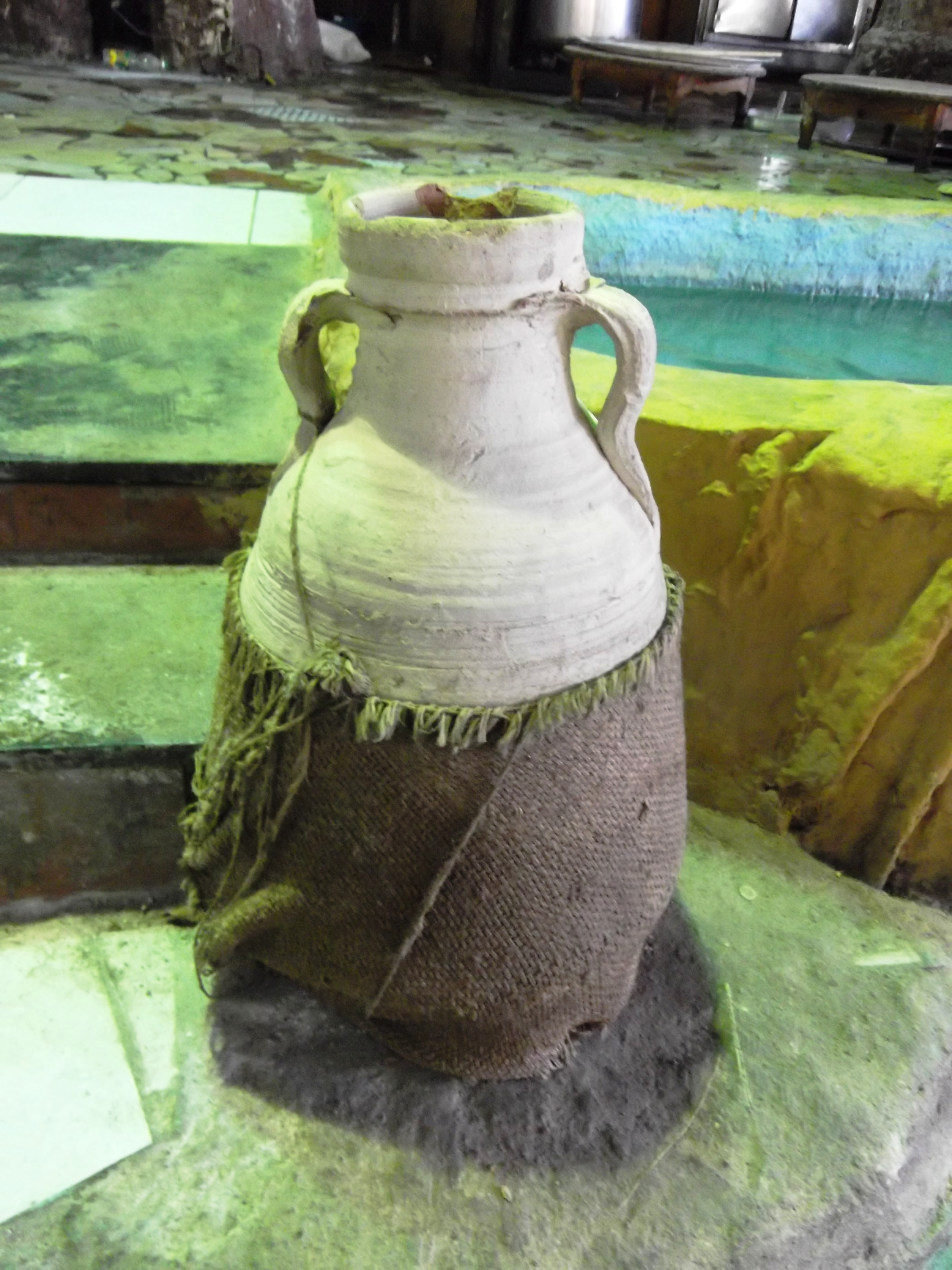 الأدوات المستخدمة لحمل المياه وتخزينها. This is an image of food from Egypt